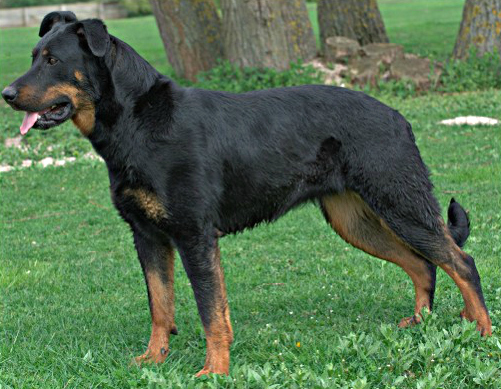 Beauceron, frz. Huetehund